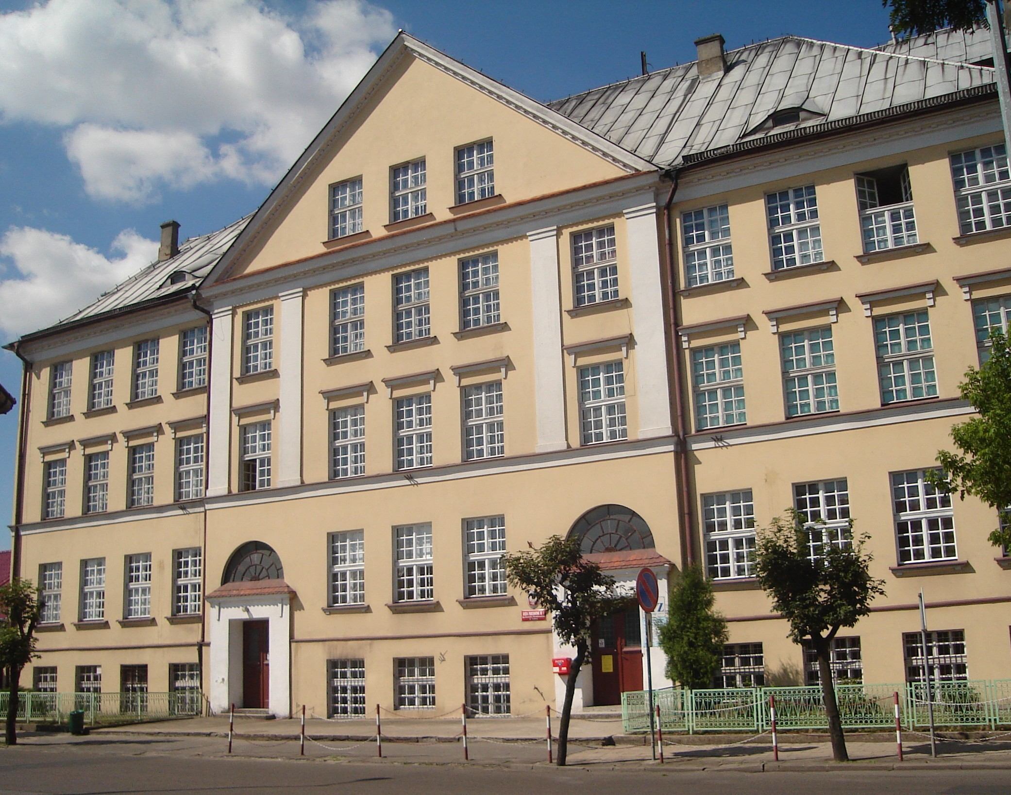 Szkołą Podstawowa nr 1 im. Henryka Sienkiewicza w Turku